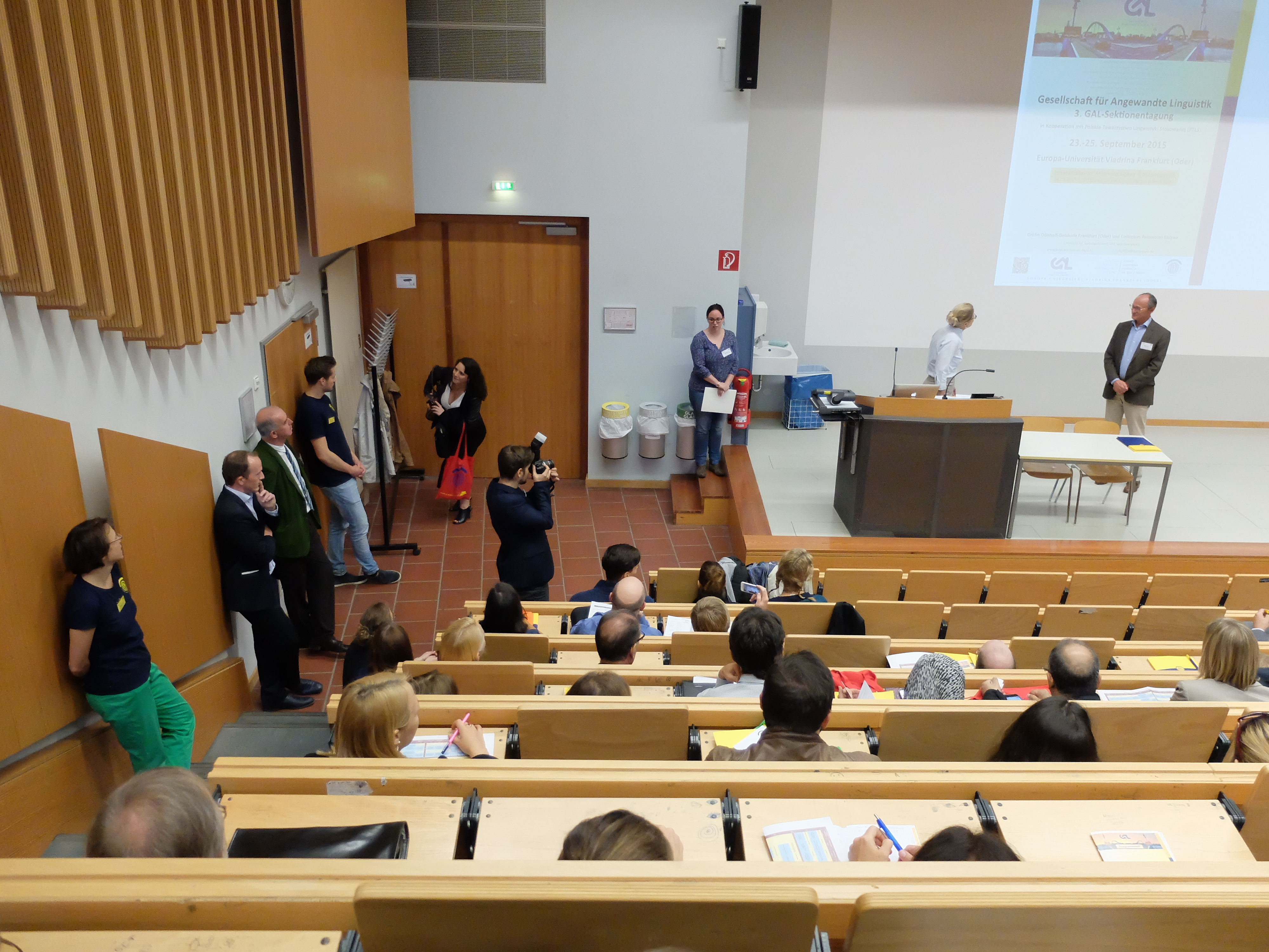 Tagung der Gesellschaft für Angewandte Linguistik, September 2015 in Frankfurt an der Oder. Eröffnungssitzung im Gräfin-Dönhoff-Gebäude.